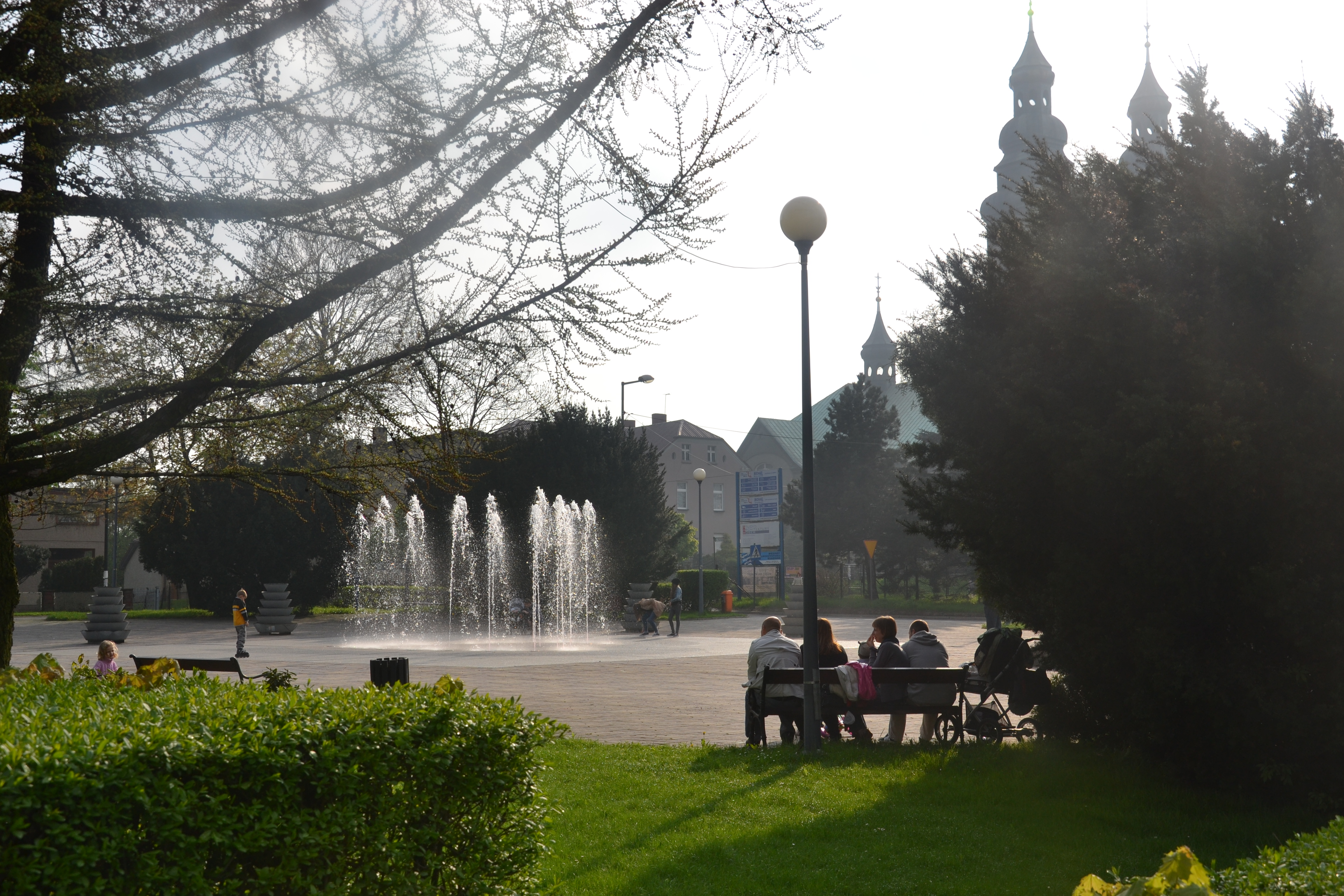 Radlin - miejski plac z fontanną